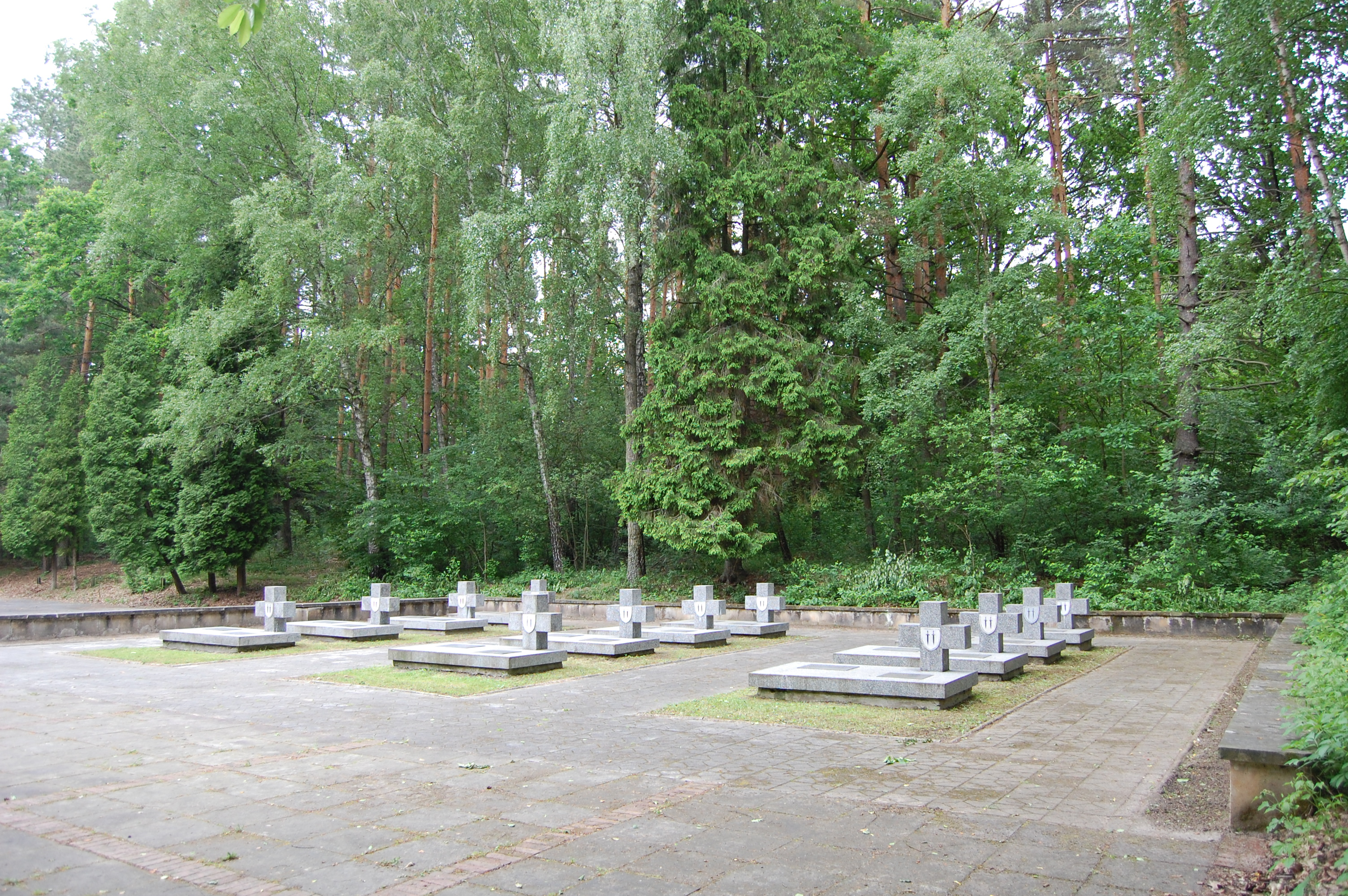 Porytowe Wzgórze - miejsce jednej z największych bitew partyzanckich okresu II wojny światowej. Był to finał niemieckiej akcji pacyfikacyjnej Sturmwind I (Wicher I), która rozegrała się w dniach 9-14 czerwca 1944 r. Do akcji przeciw partyzantom skierowano siły liczące ok. 30 tysięcy bardzo dobrze wyszkolonych żołnierzy (w tym 3 dywizje Wehrmachtu i samoloty 4 Floty Powietrznej). Zgrupowanie partyzanckie liczyło ok. 3000 ludzi. Wśród nich było 100 żołnierzy z AK i BCh, 700 z AL i 1900 partyzantów radzieckich. Po zaciętych walkach partyzanci wycofali się nocą z 14/15 czerwca w dalsze rejony Puszczy Solskiej. Zgrupowanie zachowało przy tym pełną zdolność bojową. Po wojnie na Porytowym Wzgórzu utworzono cmentarz partyzancki, odsłonięto także pomnik dłuta Bronisława Chromego. Przedstawia on 5 biegnących partyzantów, pomiędzy którymi wybucha granat. Obok krzyż i głaz pamięci żołnierzy AK i BCh.